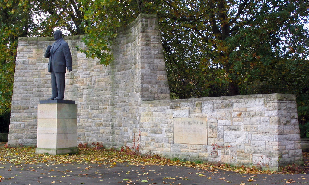 Ernst Thälmann-Denkmal am Strelasund Ufer in Stralsund